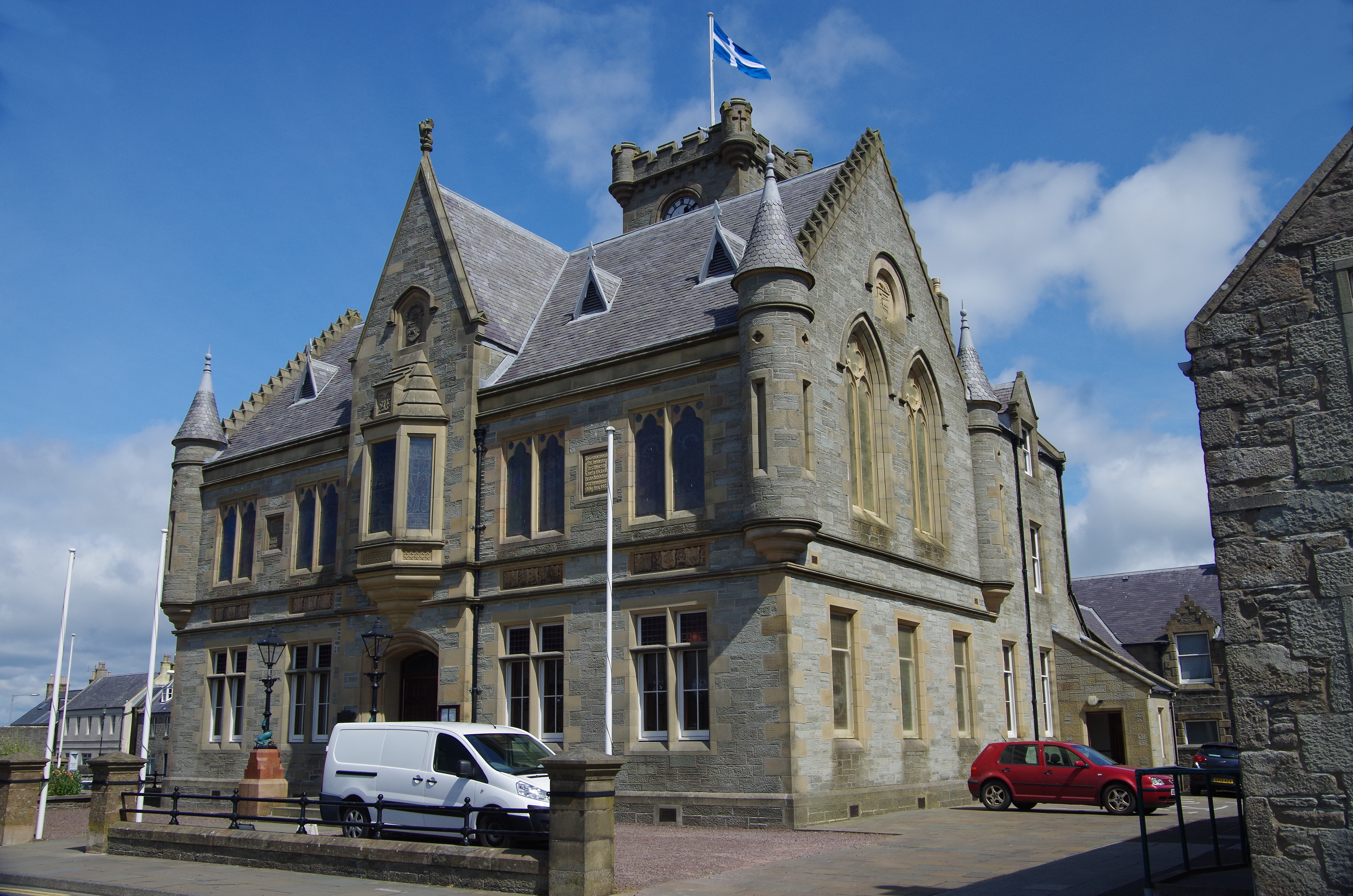 Rathaus Lerwick